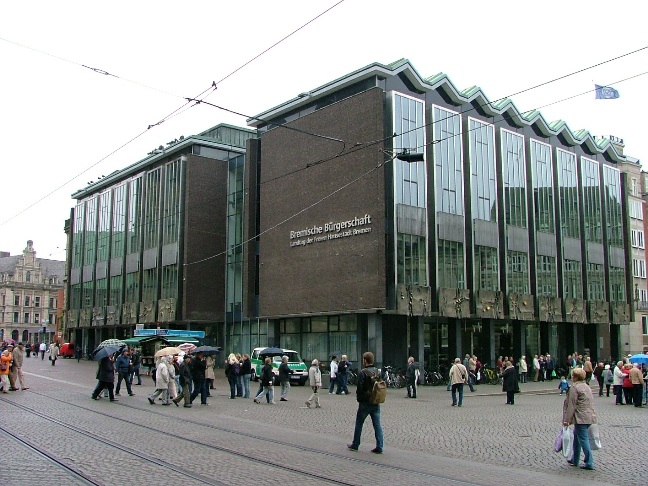 Bremische Bürgerschaft